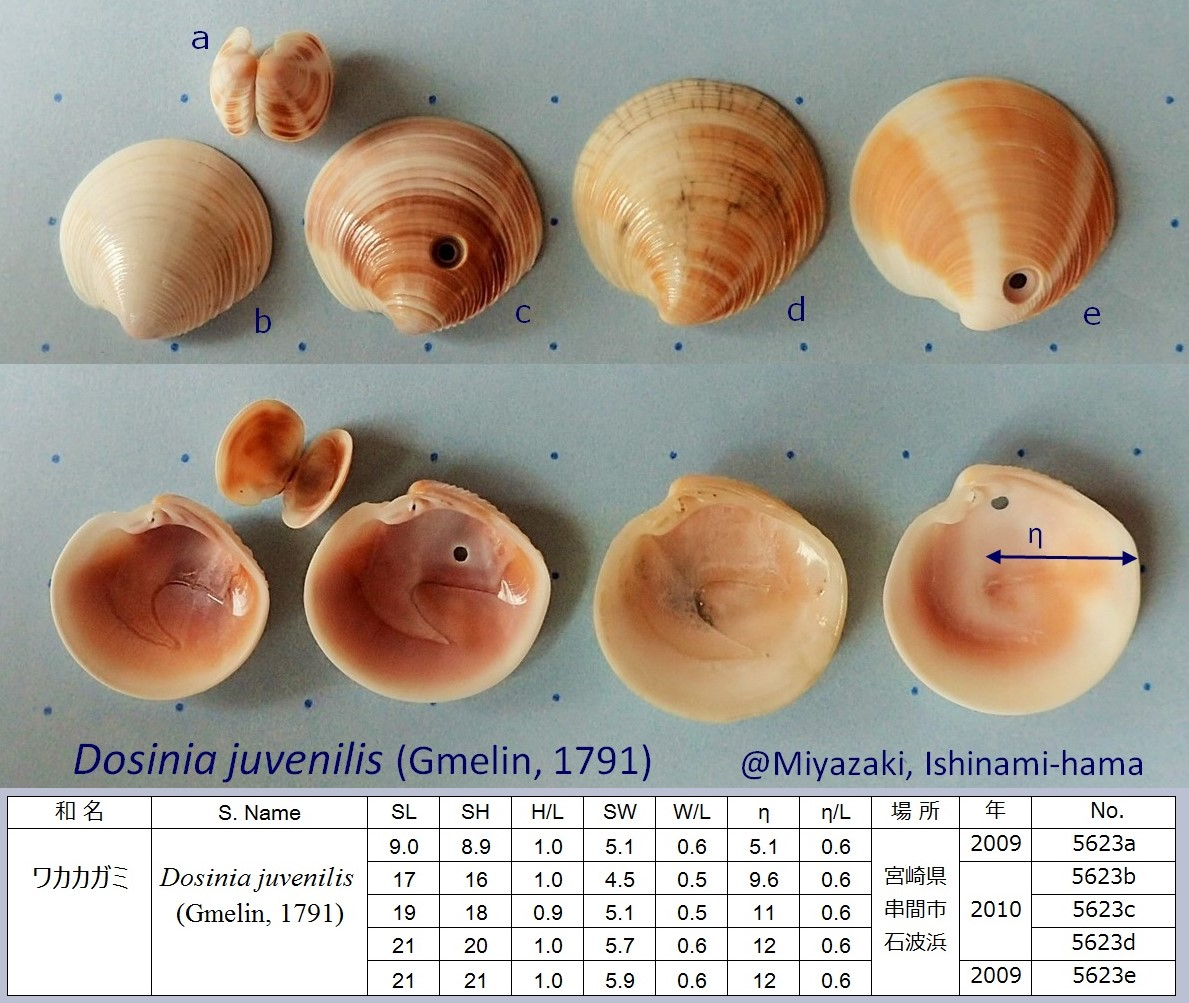 宮崎県石波浜でひろった小型のカガミガイ類。